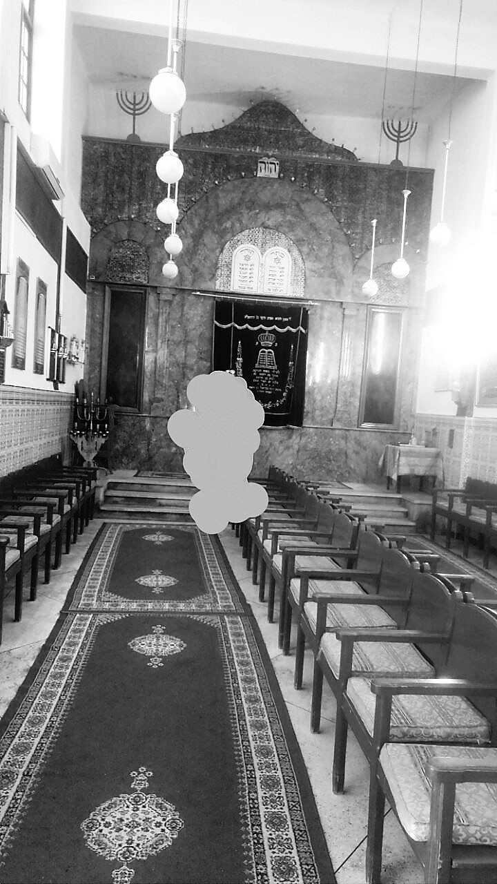 בית הכנסת בית הבחורים מגורשי ספרד